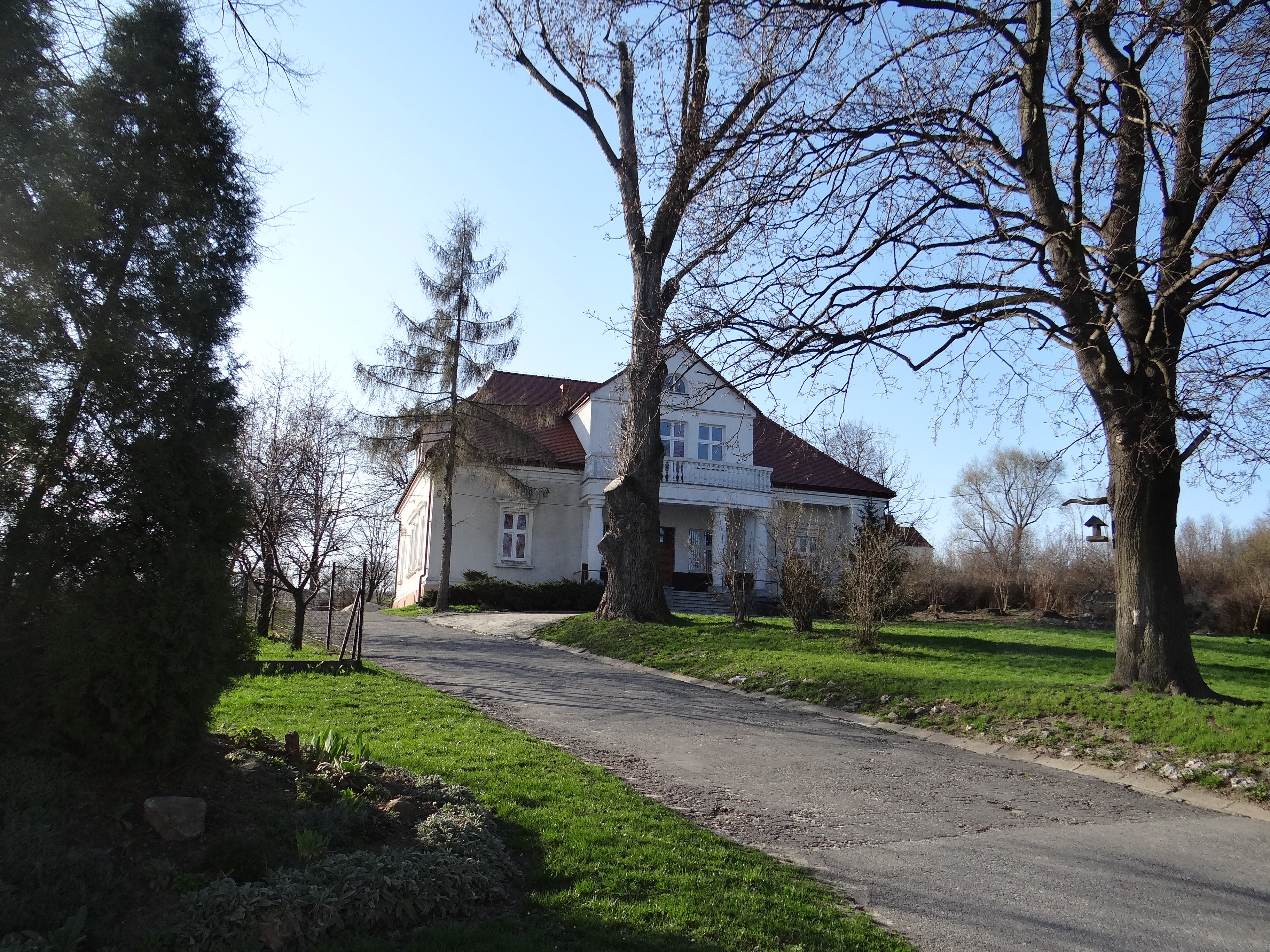 Morawica, dwór, ob. szkoła podstawowa, po 1920